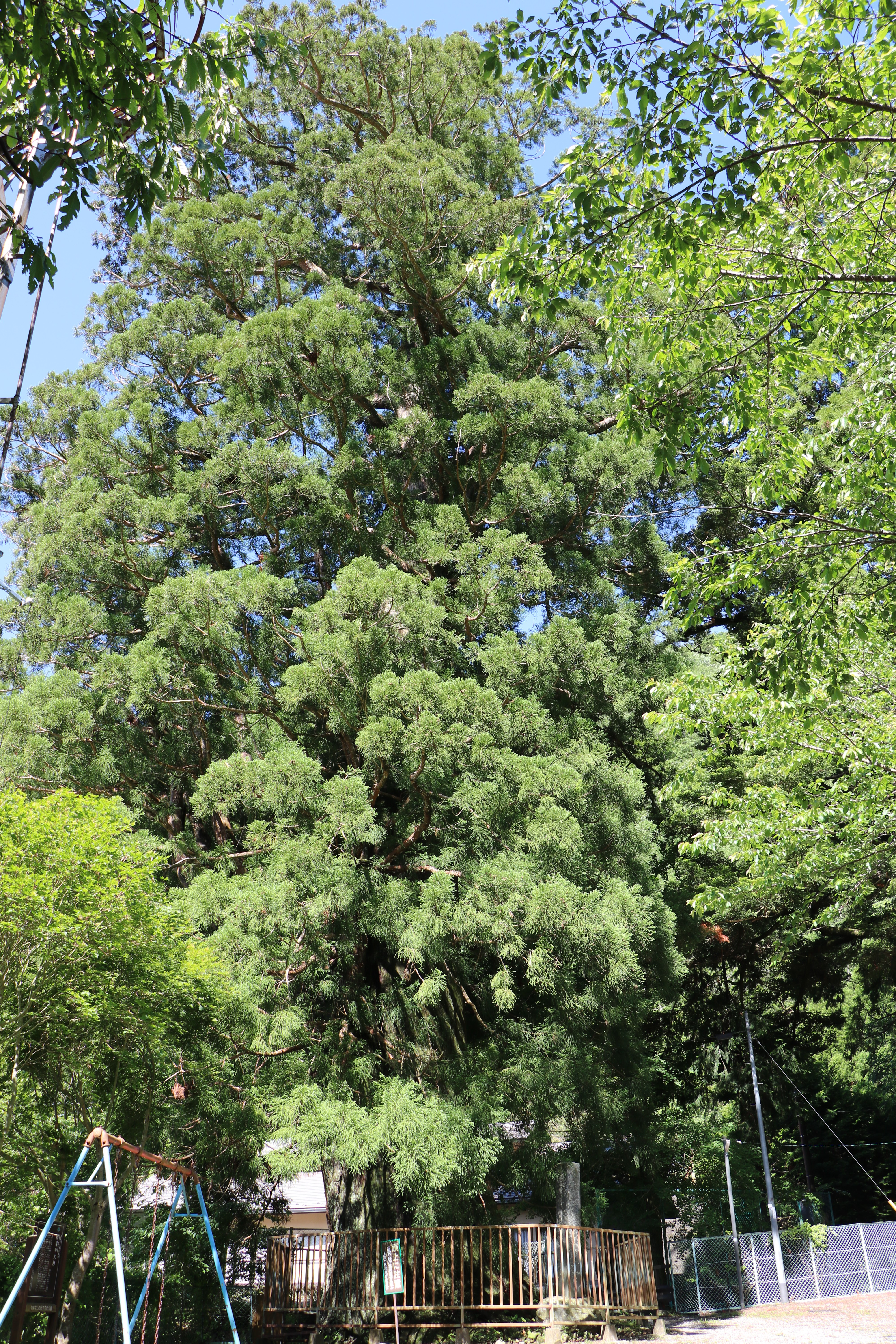 国指定天然記念物、精進の大スギ（山梨県南都留郡富士河口湖町）